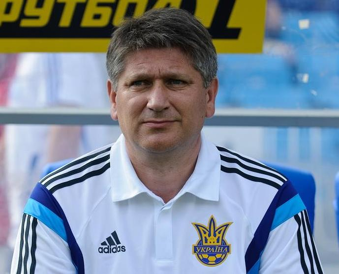 Тренер мсолодіжної збірної України Сергій Ковалець у фіналі Турніру пам'яті Валерія Лобановського 2015